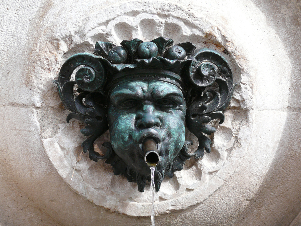 Ancona, La fontana del Calamo, detail